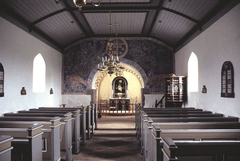 Linnerup kirke ligger i Linnerup Sogn, i det tidligere Vrads Herred Skanderborg Amt, nuværende Hedensted Kommune, Region Midtjylland. Kirken var muligvis viet til Sankt Peter i middelalderen. Kirken blev opført i romansk tid med blev næsten nybygget i forbindelse med en restaurering i 1866, d